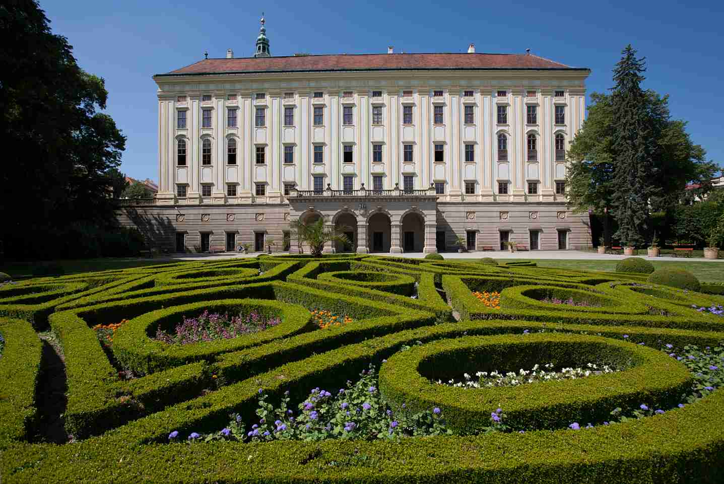 foto: Zdeněk Sodoma/MUO